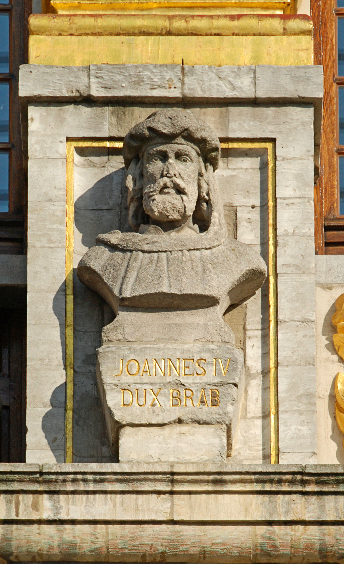 Belgique - Bruxelles - Grand-Place - Maison du Pot d'étain